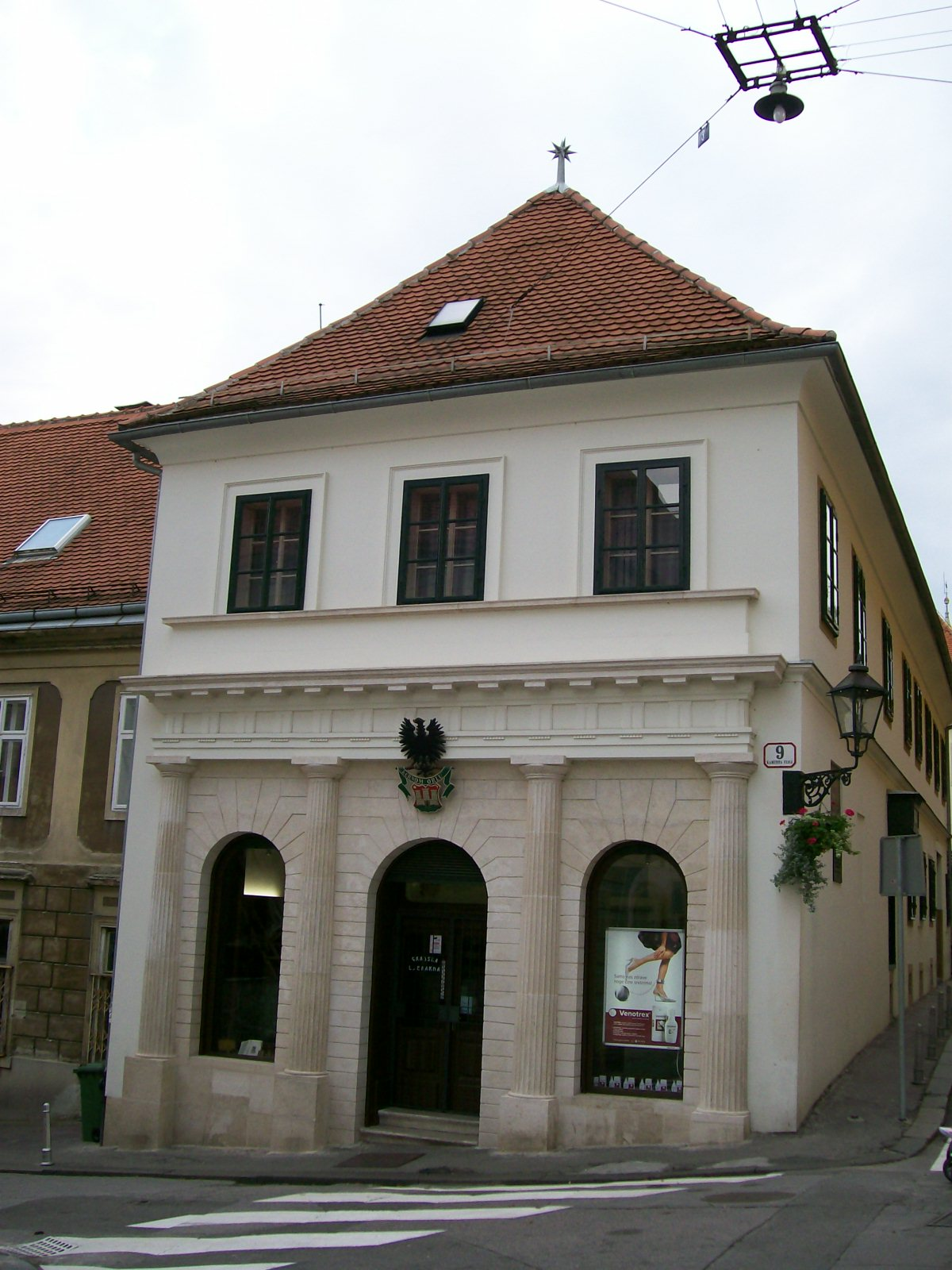 Zgrada najstarije ljekarne u Zagrebu, Kamenita ulica, Gornji grad, Zagreb